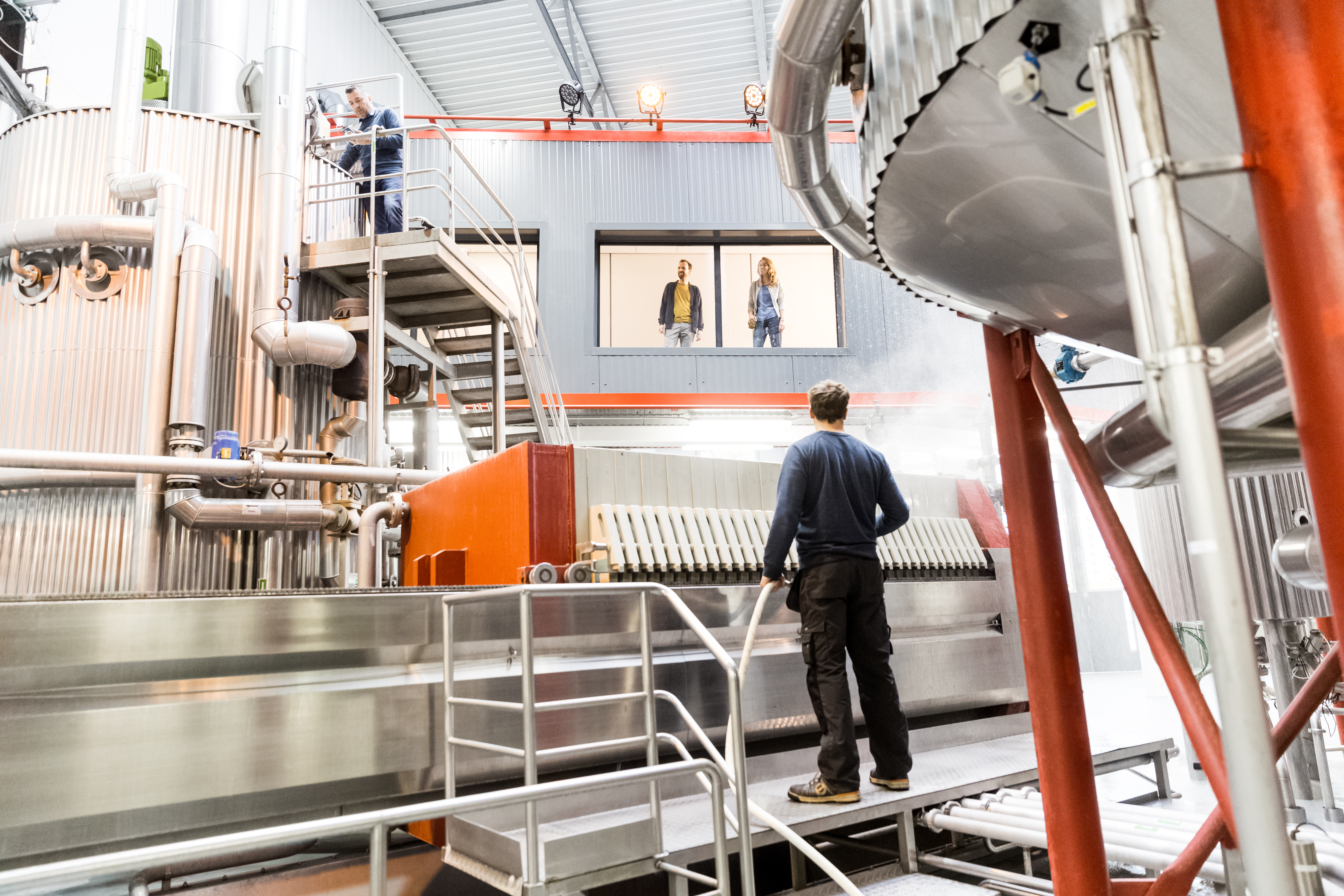 Tour door de brouwzaal